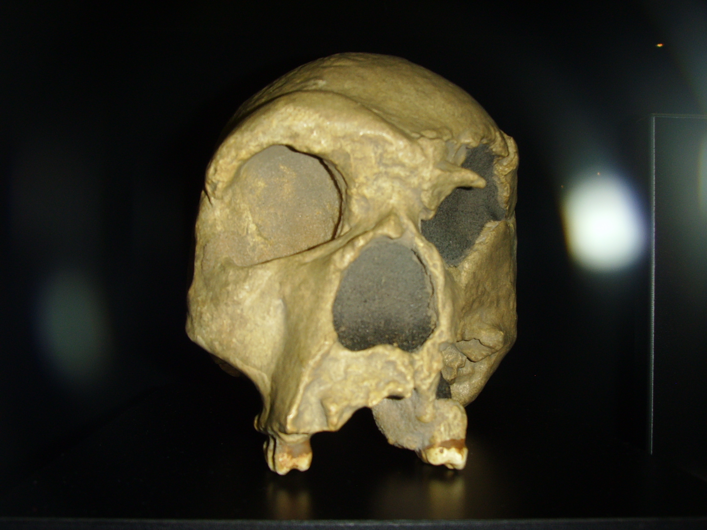 Head of Homo heidelbergensis (Replika), Senckenberg Museum, Frankfurt am Main, Germany